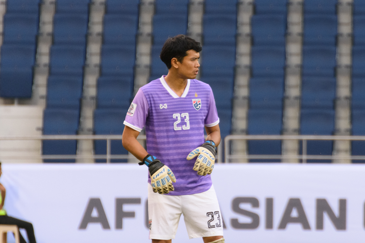 Siwarak Tedsungnoen at the Asian Cup 2019